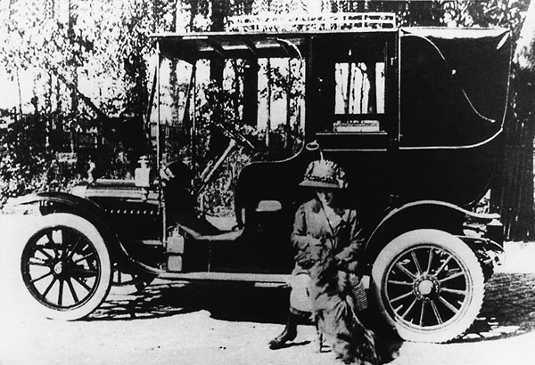 Великая княжна Мария Павловна с автомобилем «Руссо-балт» модели «К12-20» с кузовом «ландо».